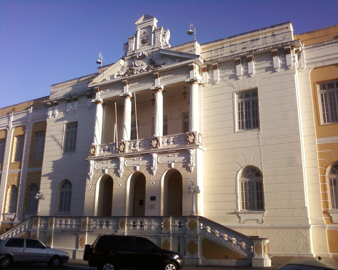 Vista frontal do Tribunal de Justiça da Paraíba.